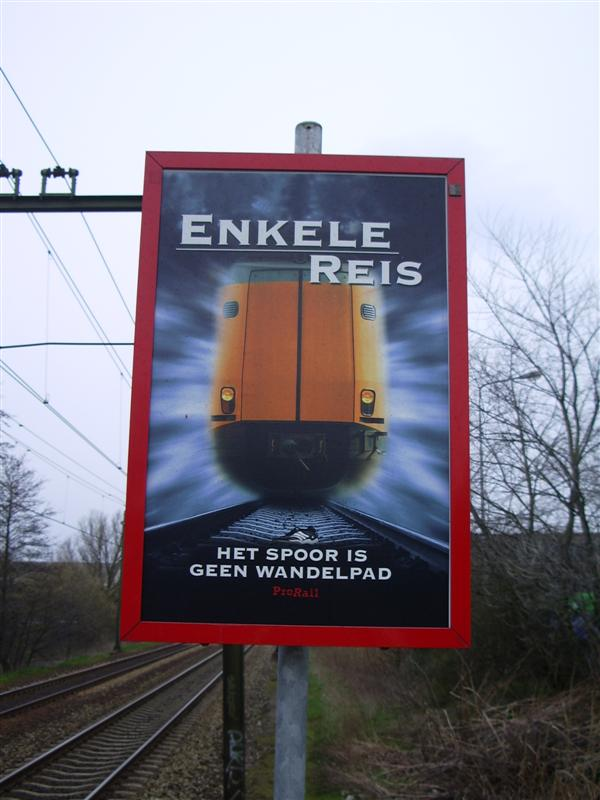 Enkele reis: het spoor is geen wandelpad (One way trip: the railroad is not a walkway). Waarschuwingsbord van ProRail, aan het einde van het perron te Delft Zuid.